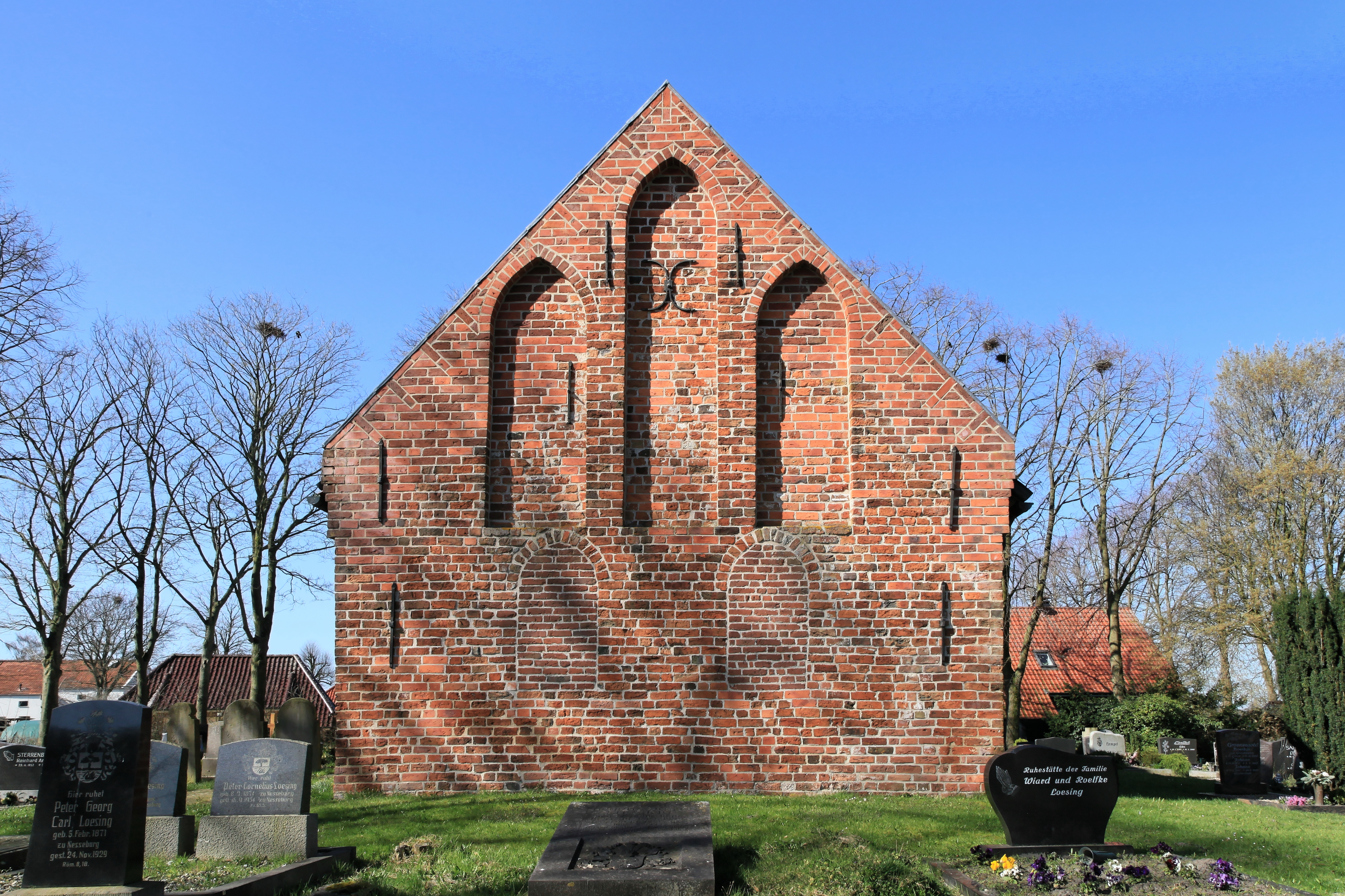 Vellager Friedhof und Vellager Kirche, Villdobben in Vellage, Weener